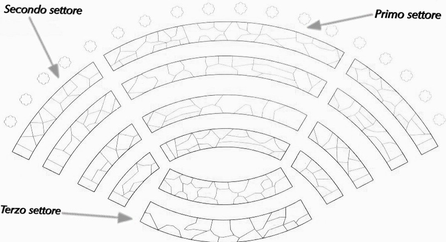 Il giardino è distinto in più settori